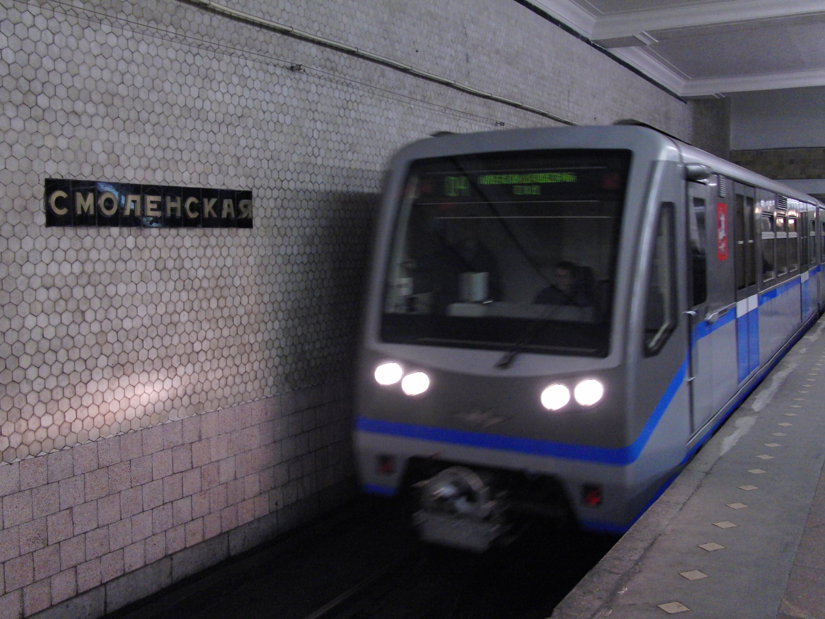 Smolenskaya - Filyovskaya line (Смоленская - ФЛ)